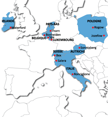 Implantation des Foyers de Charité en Europe (hors France)